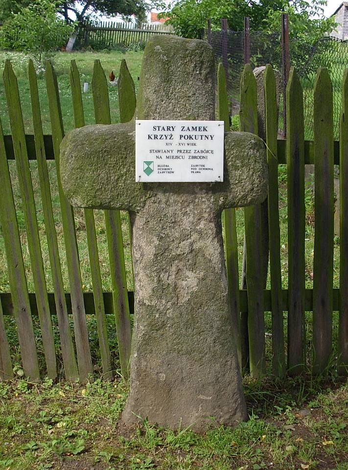 Stary Zamek. Krzyż kamienny.